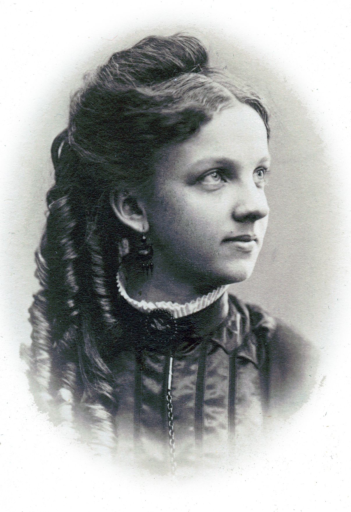 Clara Rylander, skådespelare vid Mindre teatern 1868